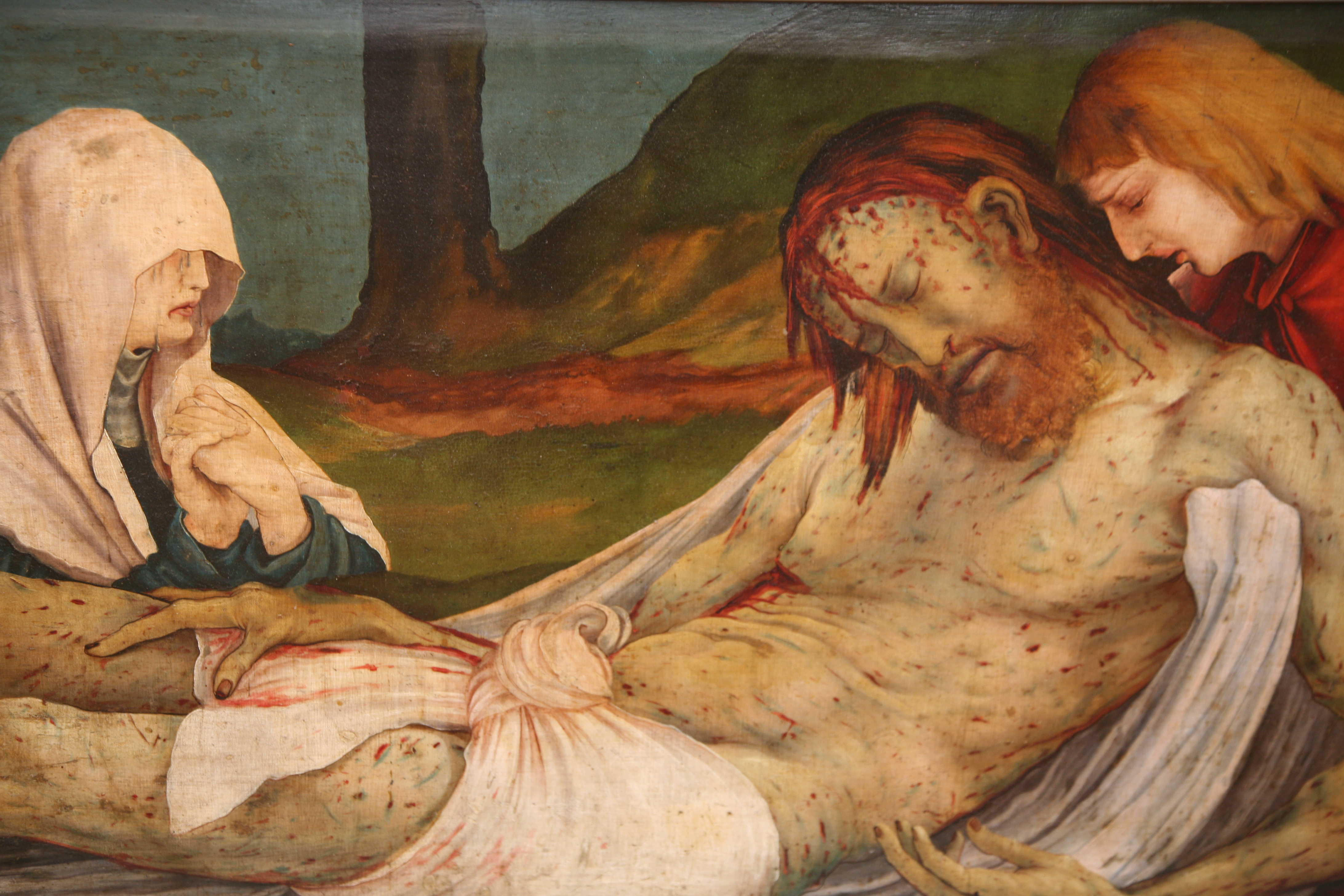 Alsace, Haut-Rhin, Colmar, Musée d'UnterLinden : Mathias Grünewald, " retable d'Issenheim : la descente de Croix, détail " entre 1512 et 1516.